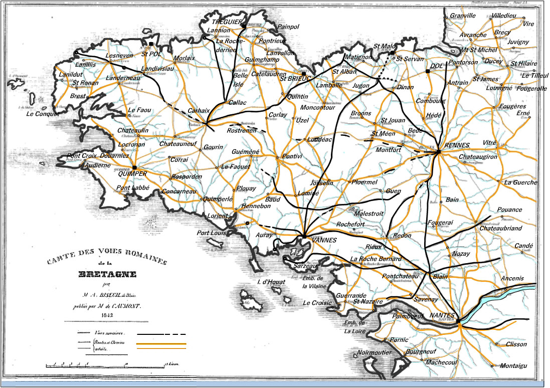 Le réseau routier figuré et l'orthographe des agglomérations sont ceux de l'époque. Le document original (publié dans le "Bulletin Monumental") peut être consulté sur le site Gallica